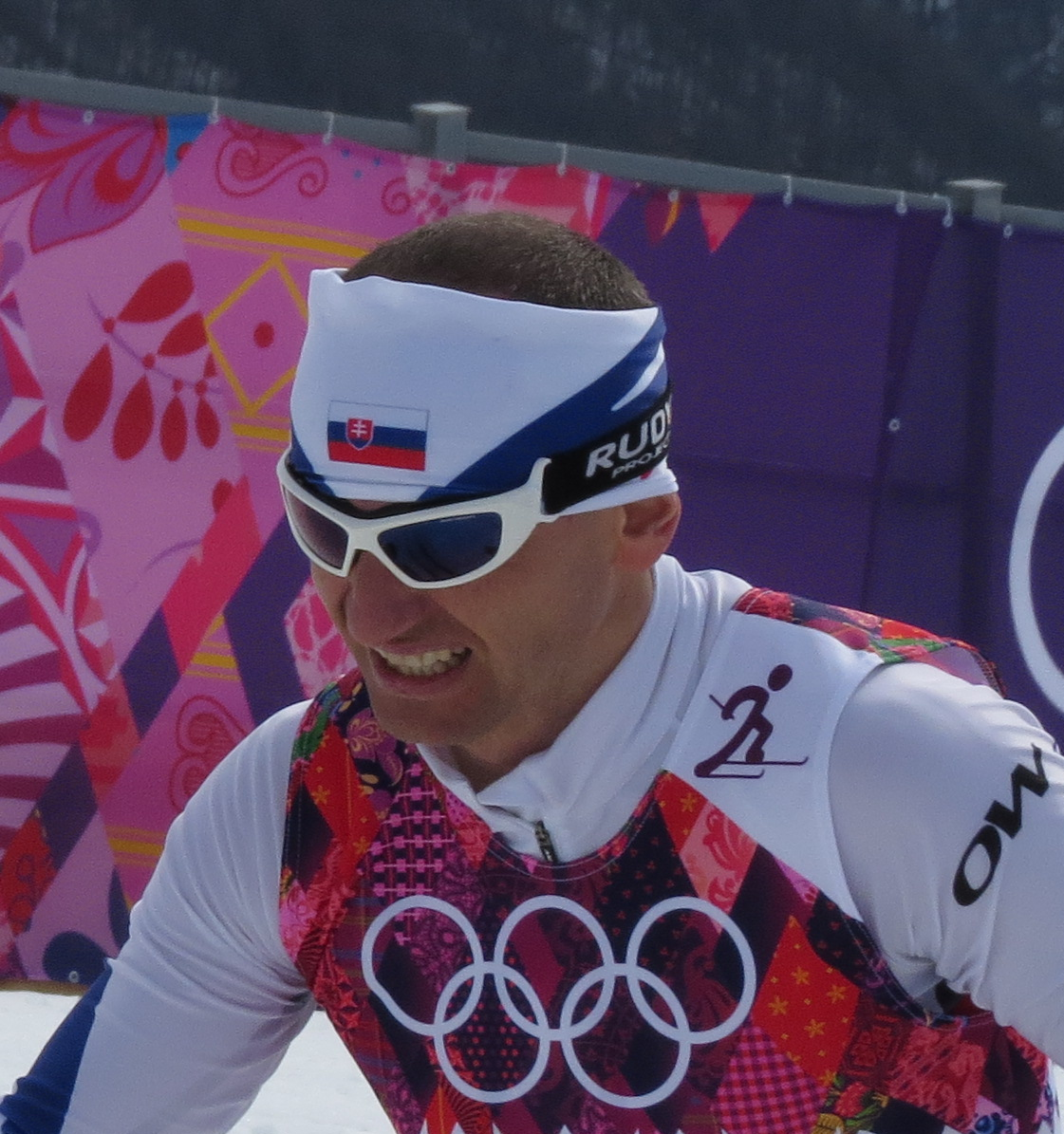 Лыжные гонки на зимних Олимпийских играх 2014 — 15 км классическим стилем (мужчины)